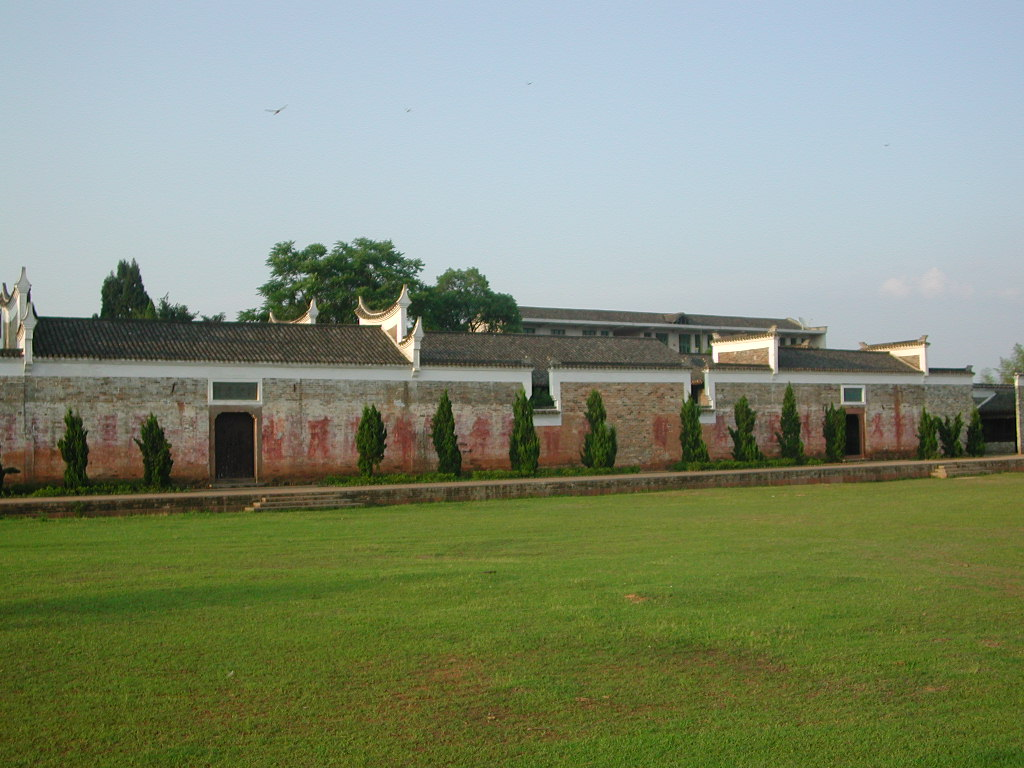 湖南省平江县安定镇小田村杜甫墓祠外景。 FatCatHu摄于2006年5月4日。